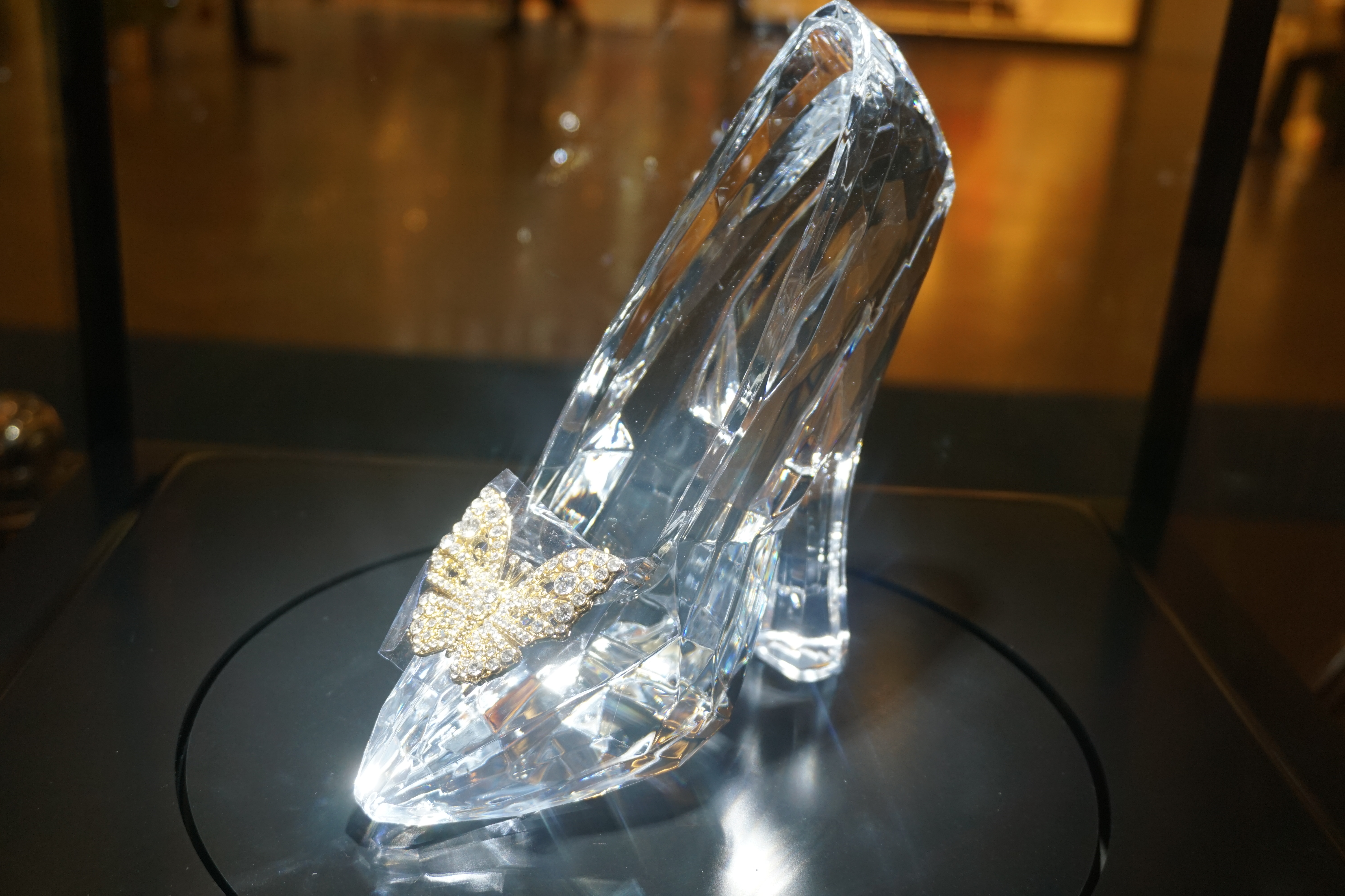 Cinderella Glass Slipper